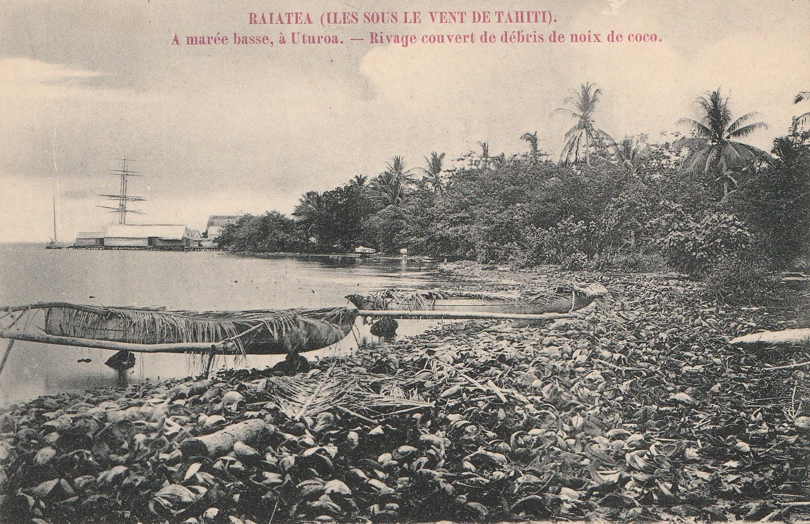 Raiatea. Iles Sous le Vent de Tahiti. A marée basse à Uturoa. Rivage recouvert de débris de noix de coco. Carte postale ancienne.